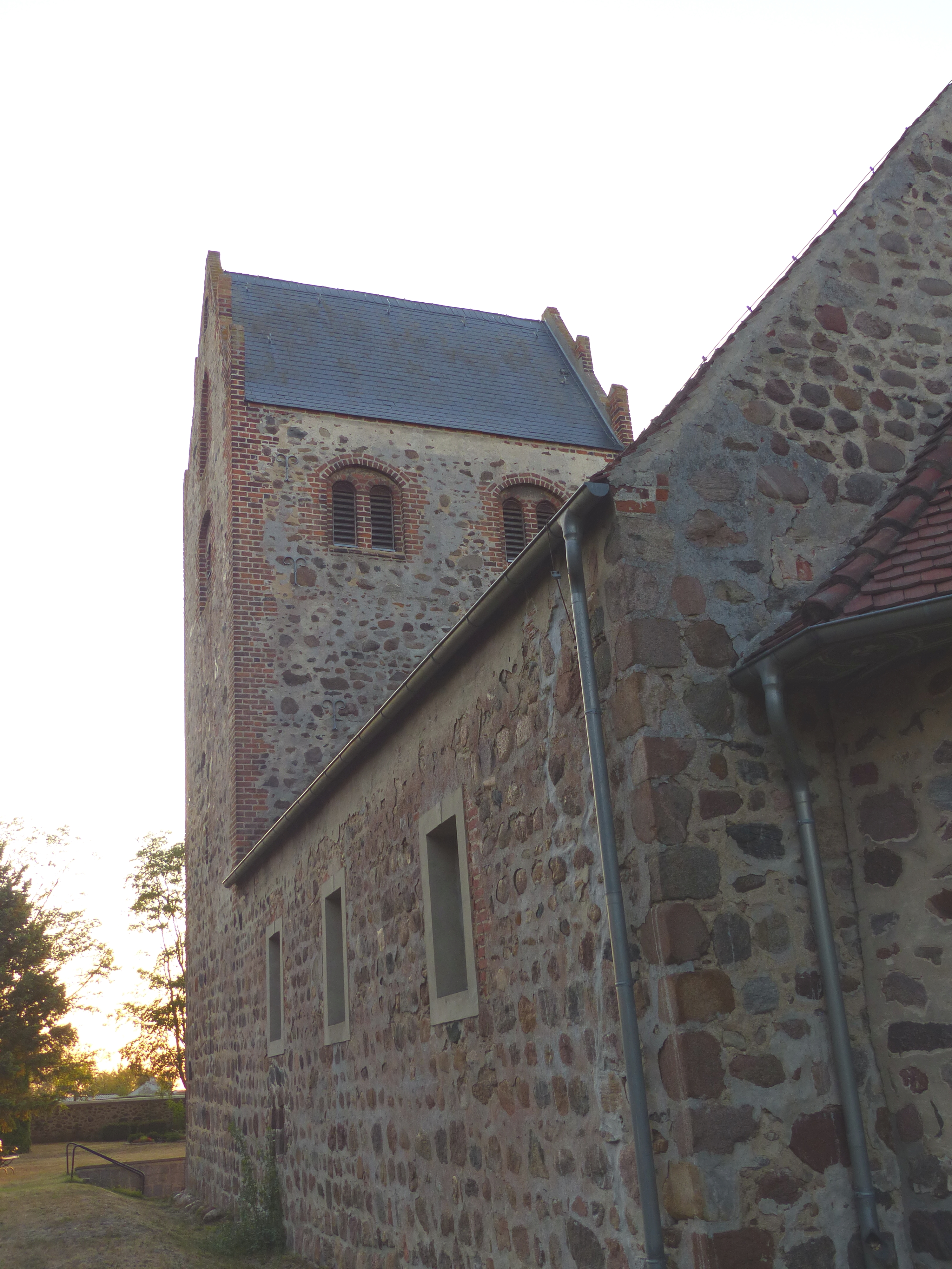 Dorfkirche Baben, Gemeinde Eichstedt (Altmark)